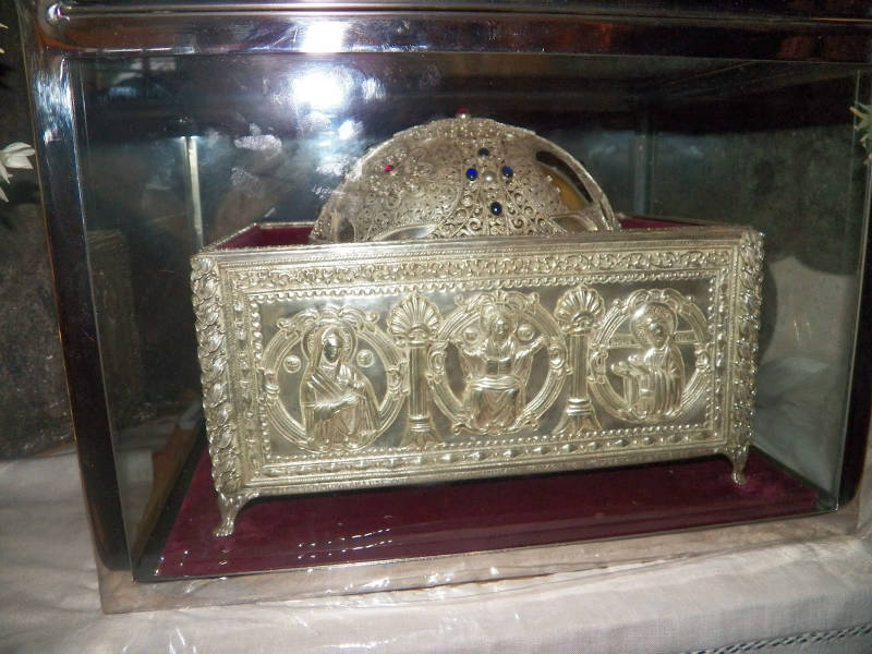 Όσιος Λαυρέντιος